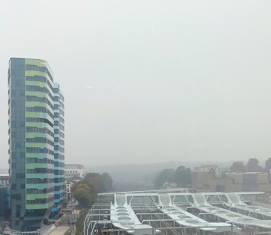 Rechts de World Trade Centers in Arnhem, naast het station.